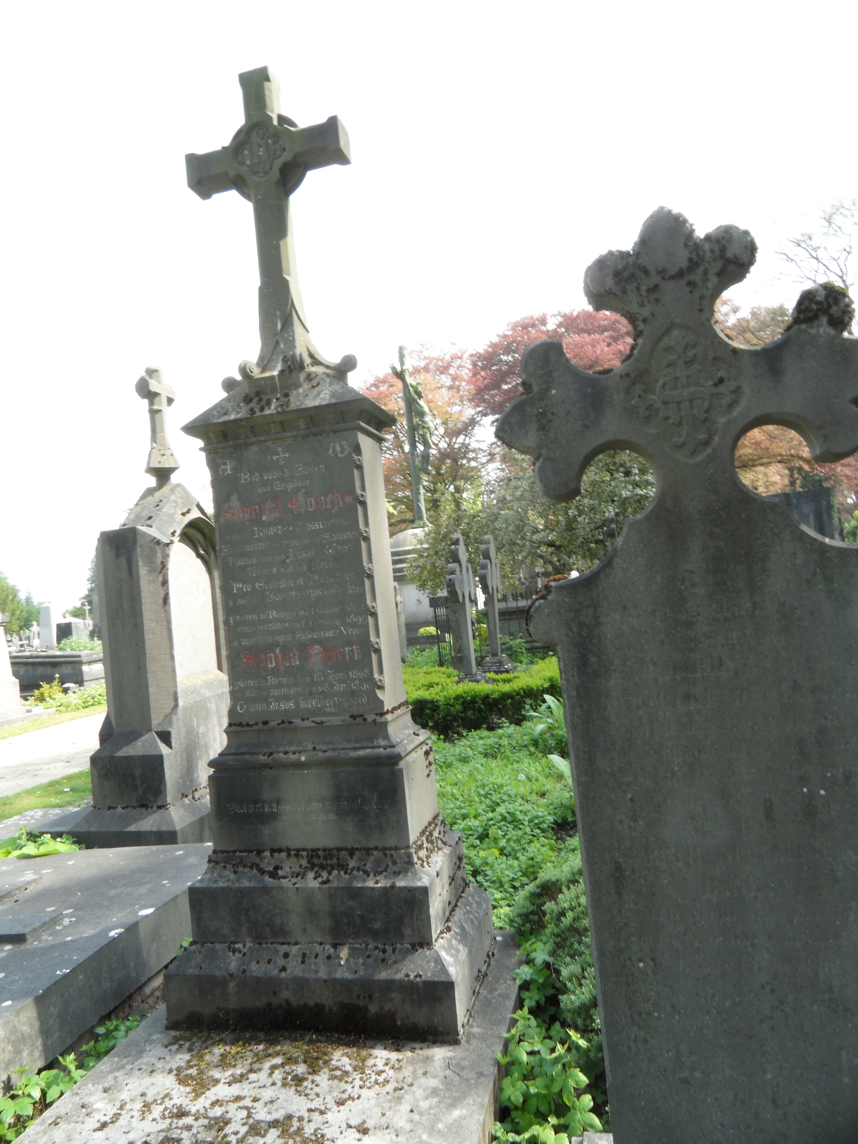 Grafmonument Samuel Coucke (Kerkhof Brugge)